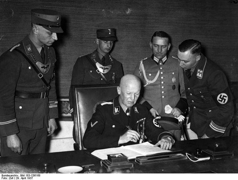 Berlin, Hans Heinrich Lammers Staatssekretär Lammers zeichnete heute mittag mit seinem Adjutanten Hauptmann Decker im Standartensaal der Obersten SA Führung zum Dankopfer der Nation. Photo Zoll, 29. April 1937 [Berlin.- Reichsminister und Chef der Reichskanzlei Dr. Hans Heinrich Lammers in SS-Uniform als Brigadeführer am Schreibtisch sitzend, Papiere unterzeichnend] Abgebildete Personen: Lammers, Hans-Heinrich Dr.: Reichsminister, Chef der Reichskanzlei, Deutschland